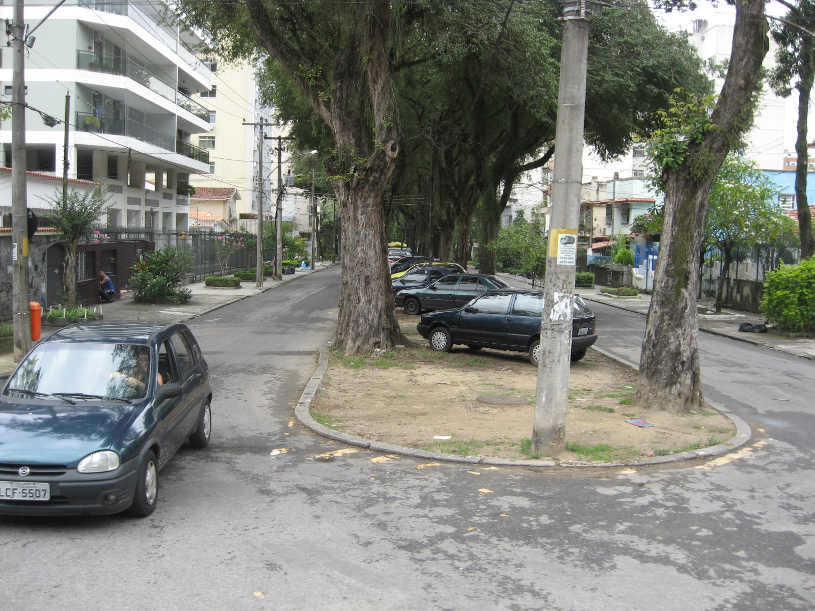 Avenida Engenheiro Richard, localizada no bairro do Grajaú, na cidade do Rio de Janeiro.